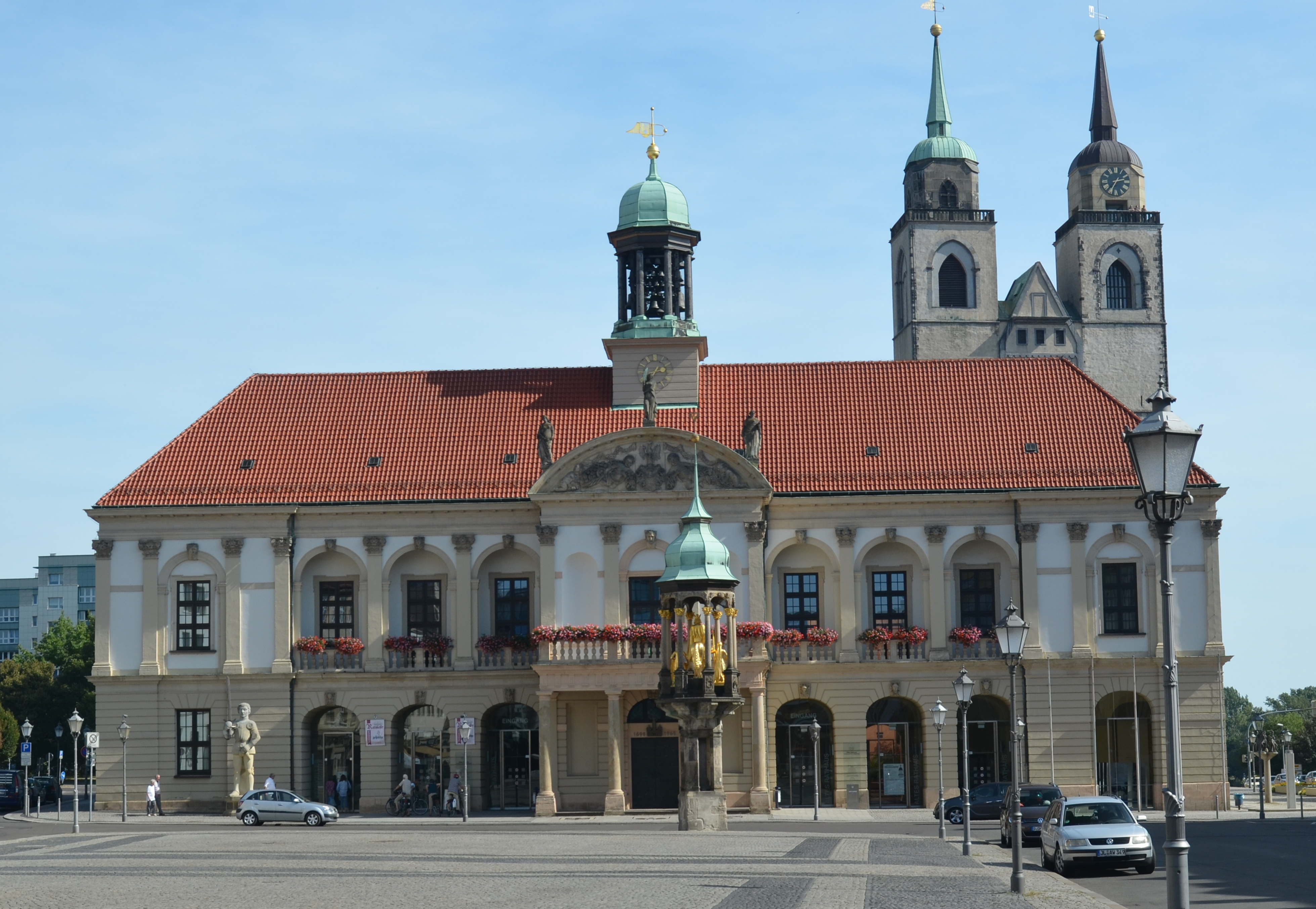 Magdeburg Alter Markt mit Rathaus